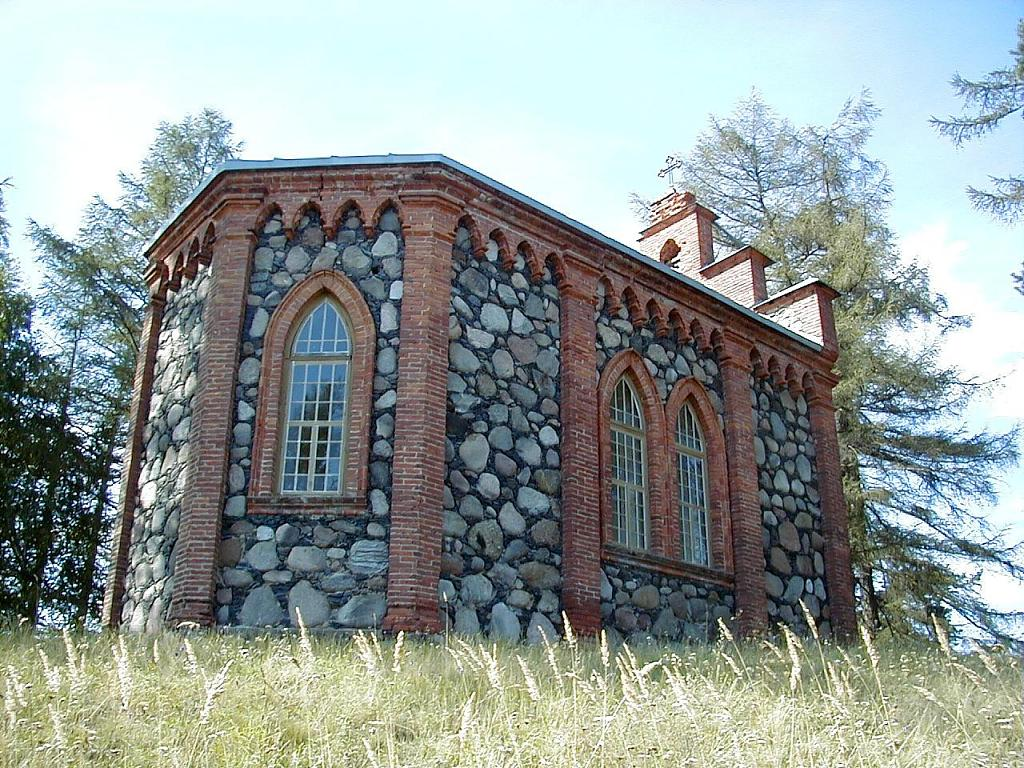 Salnavas Svētā Jāņa saucēja balss tuksnesī Romas katoļu baznīca 2002-08-10